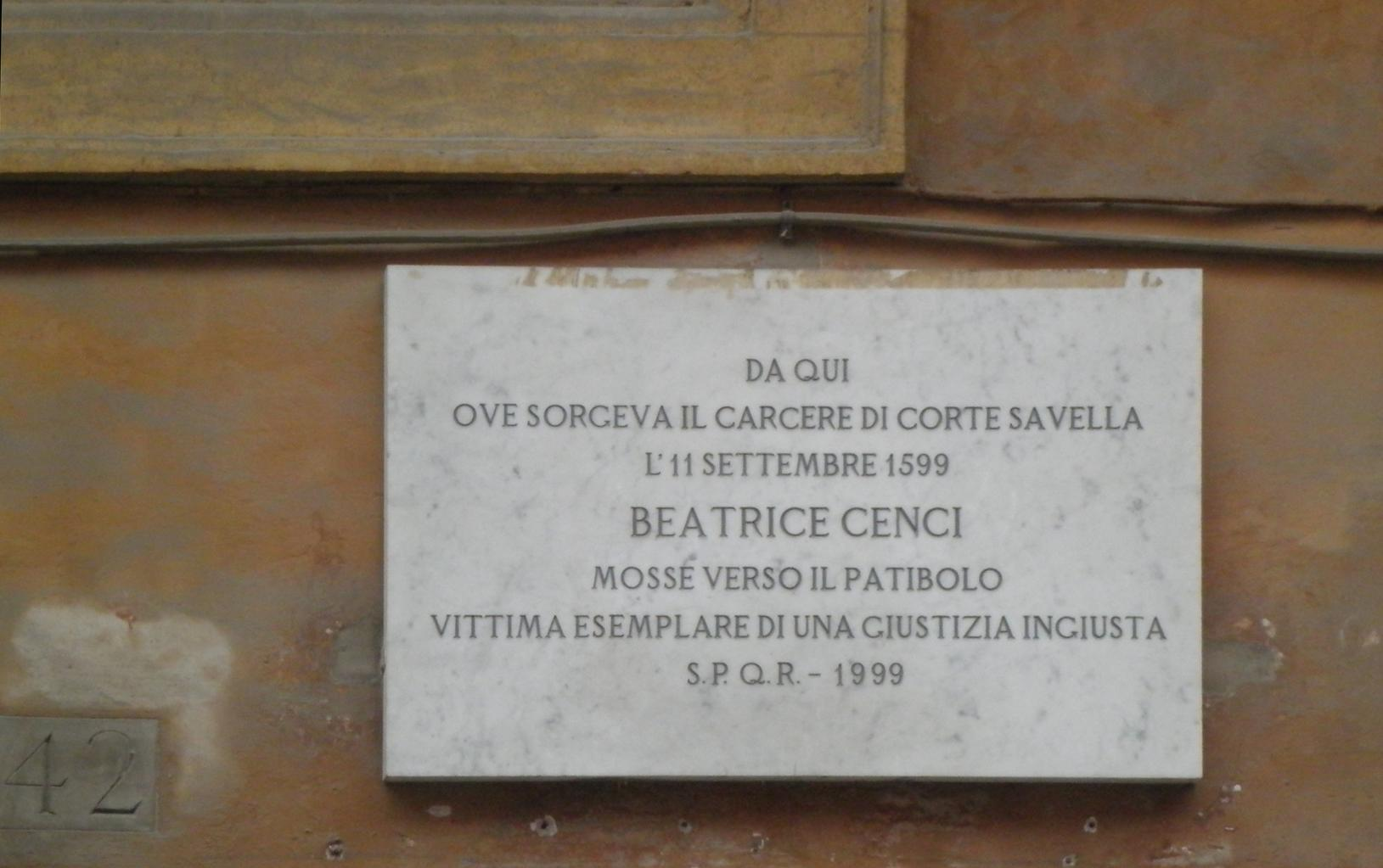 Roma, via di Monserrato 42. Memoria di Beatrice Cenci a Corte Savella (1999).